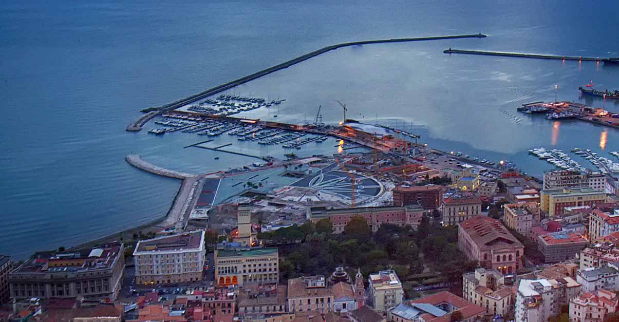 Piazza della Libertà a Salerno in corso di realizzazione nel 2012